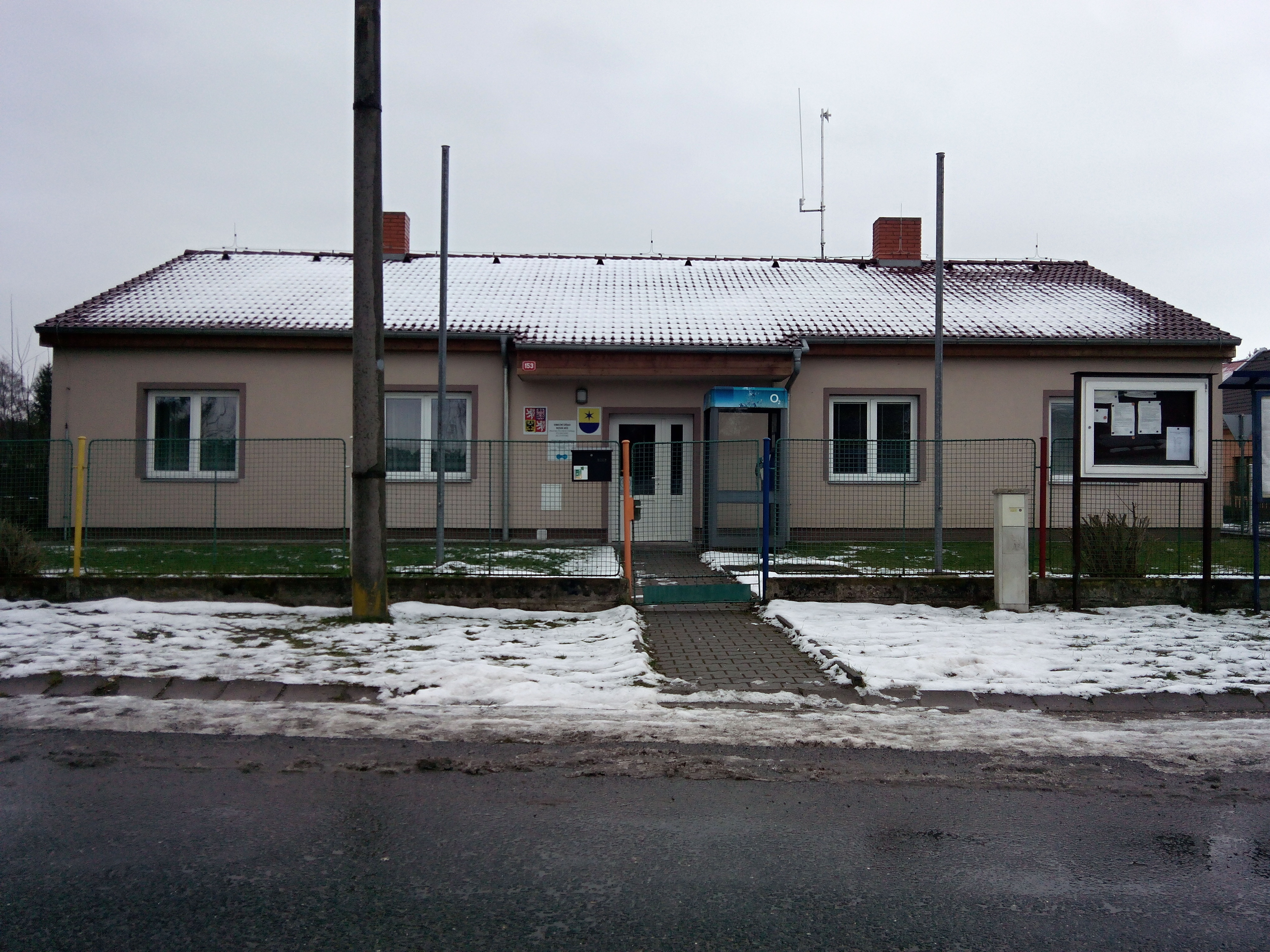 Obecní úřad obce Nová Ves